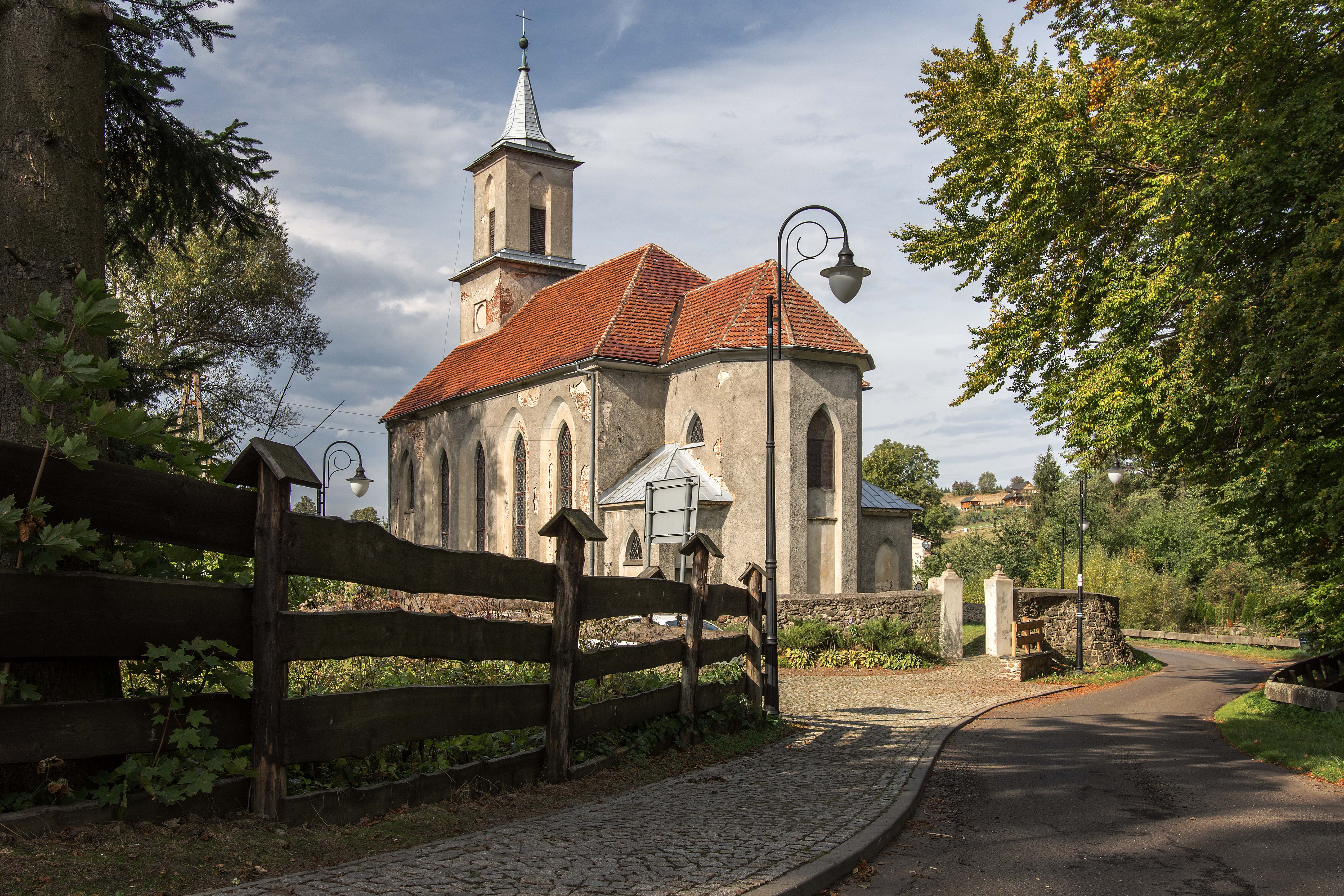 Glinno, kościół fil. p.w. Matki Boskiej Bolesnej, 1827-1830